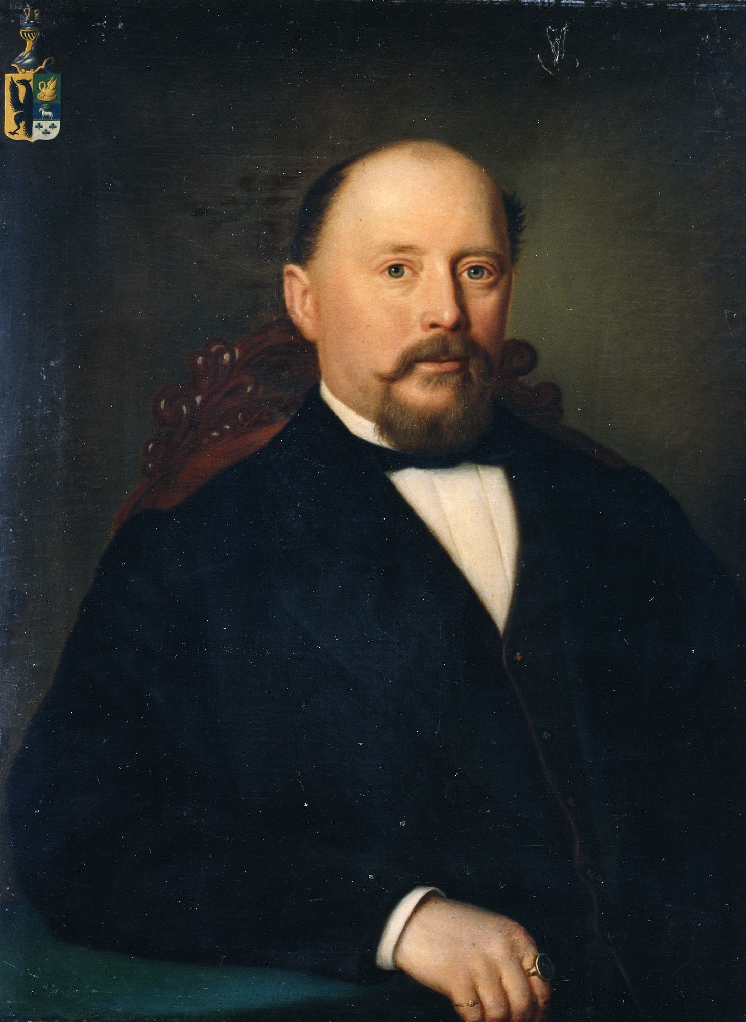 Bernhardus Hopperus Buma (1826-1892), burgemeester van Westdongeradeel, later van Kollumerland en Kruisland.